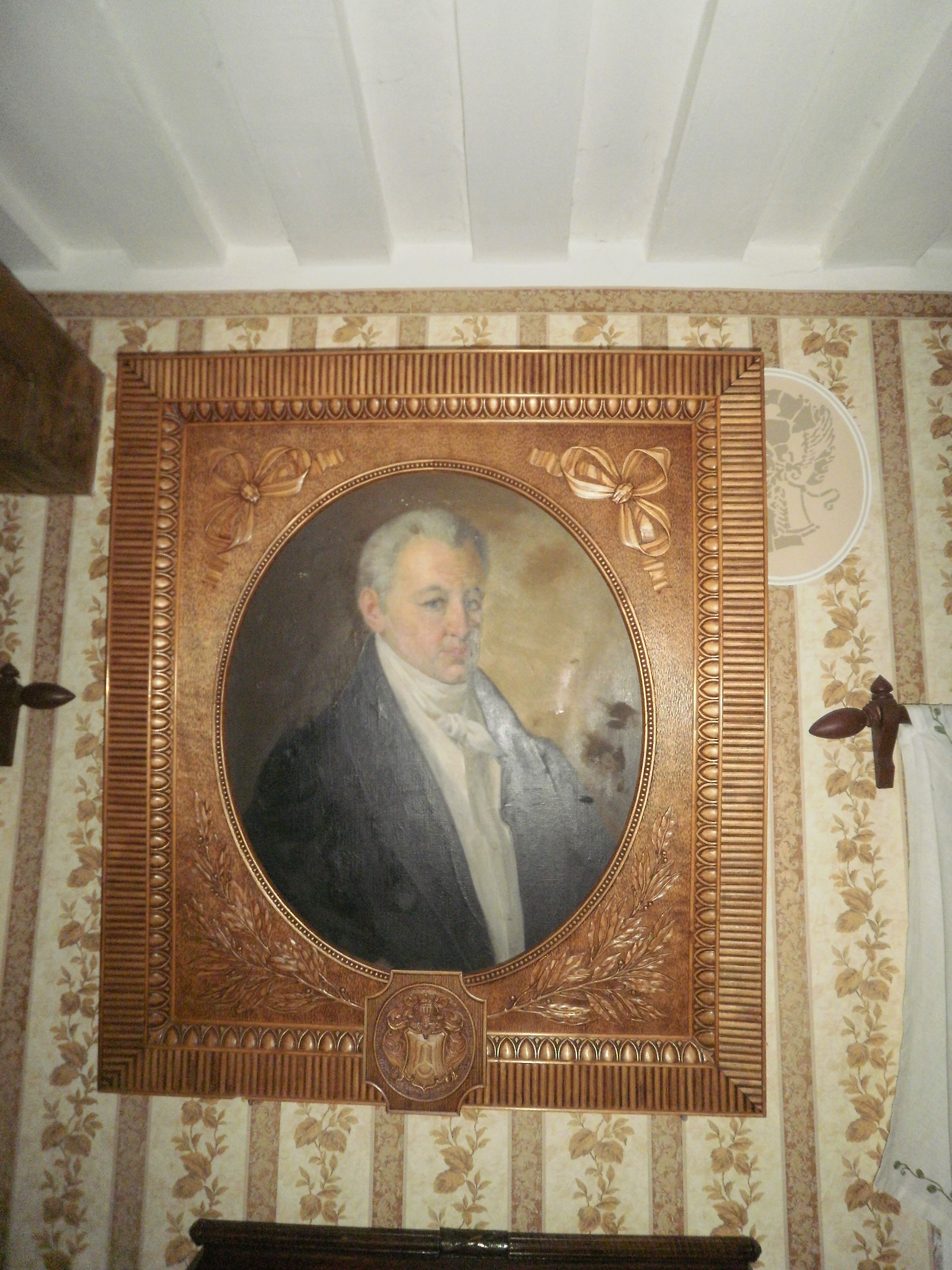 Хата (Музей-садиба Івана Котляревського), Полтава, Соборна площа, 3